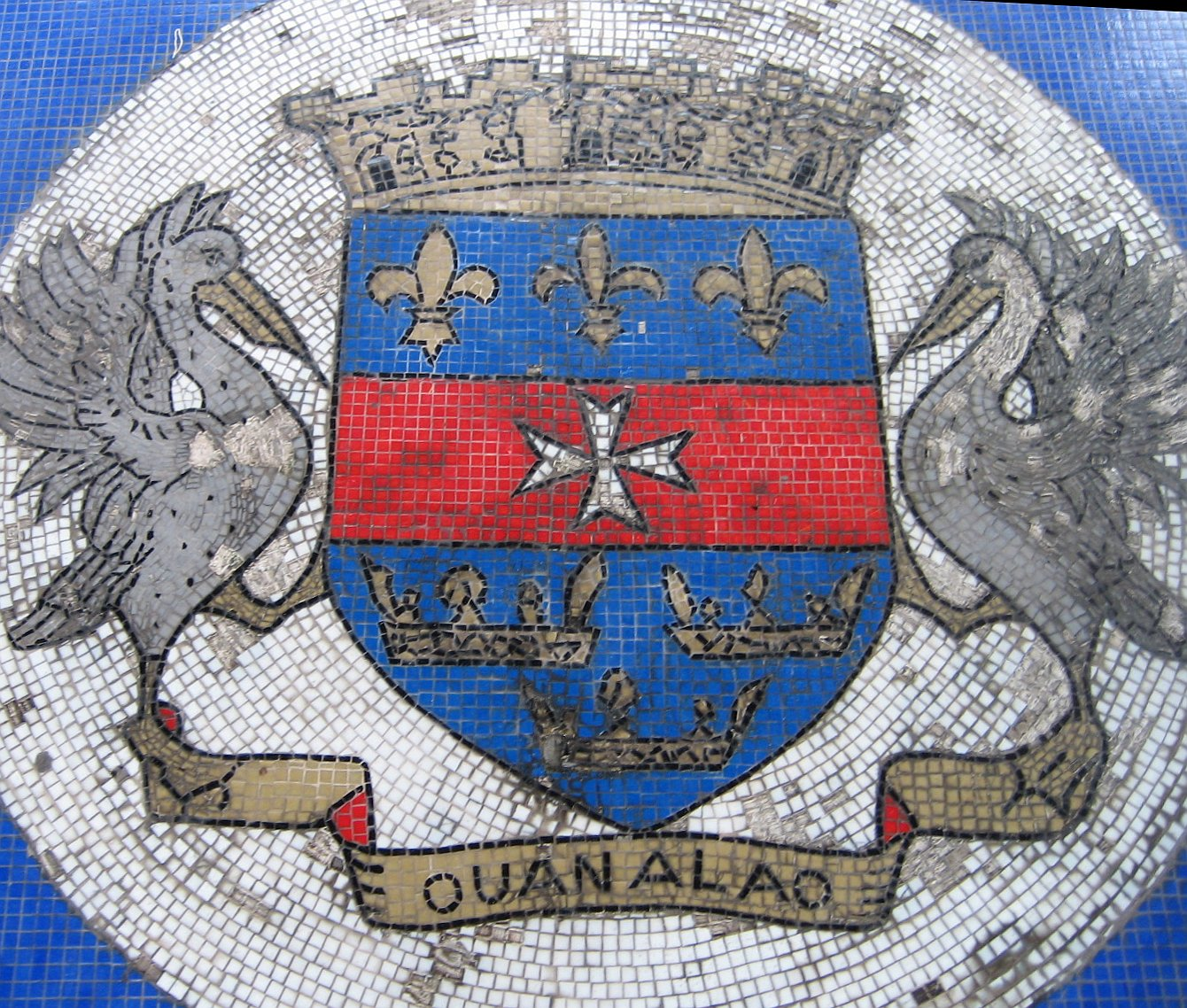 Wope vun Saint-Barthélemy (Insel); Mosaik am Hafe vu Gustavia.